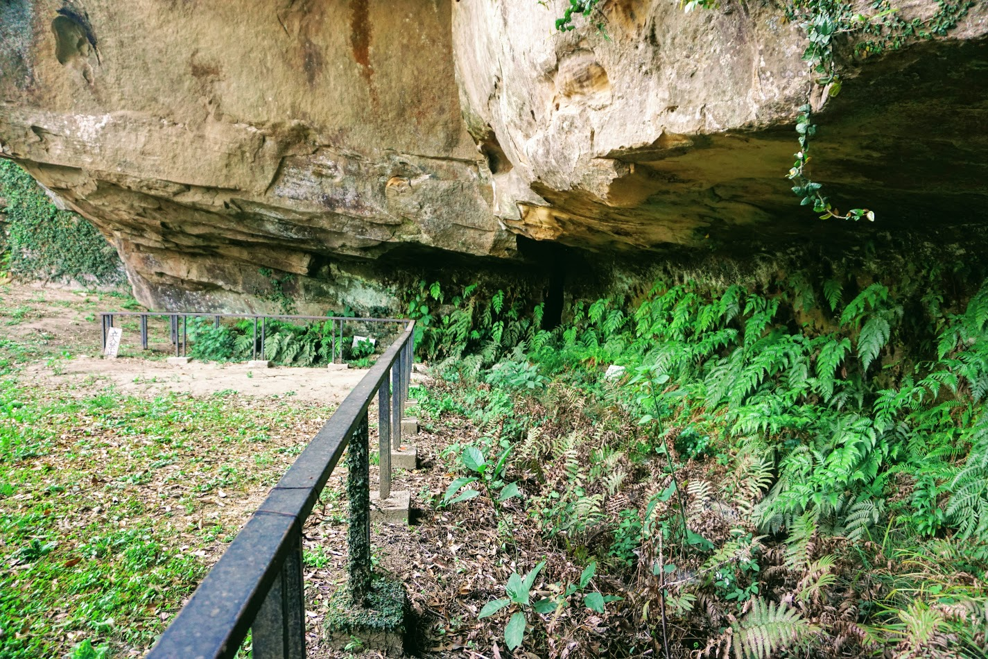 長崎県佐世保市にある岩下洞穴の出土品発掘場所付近。